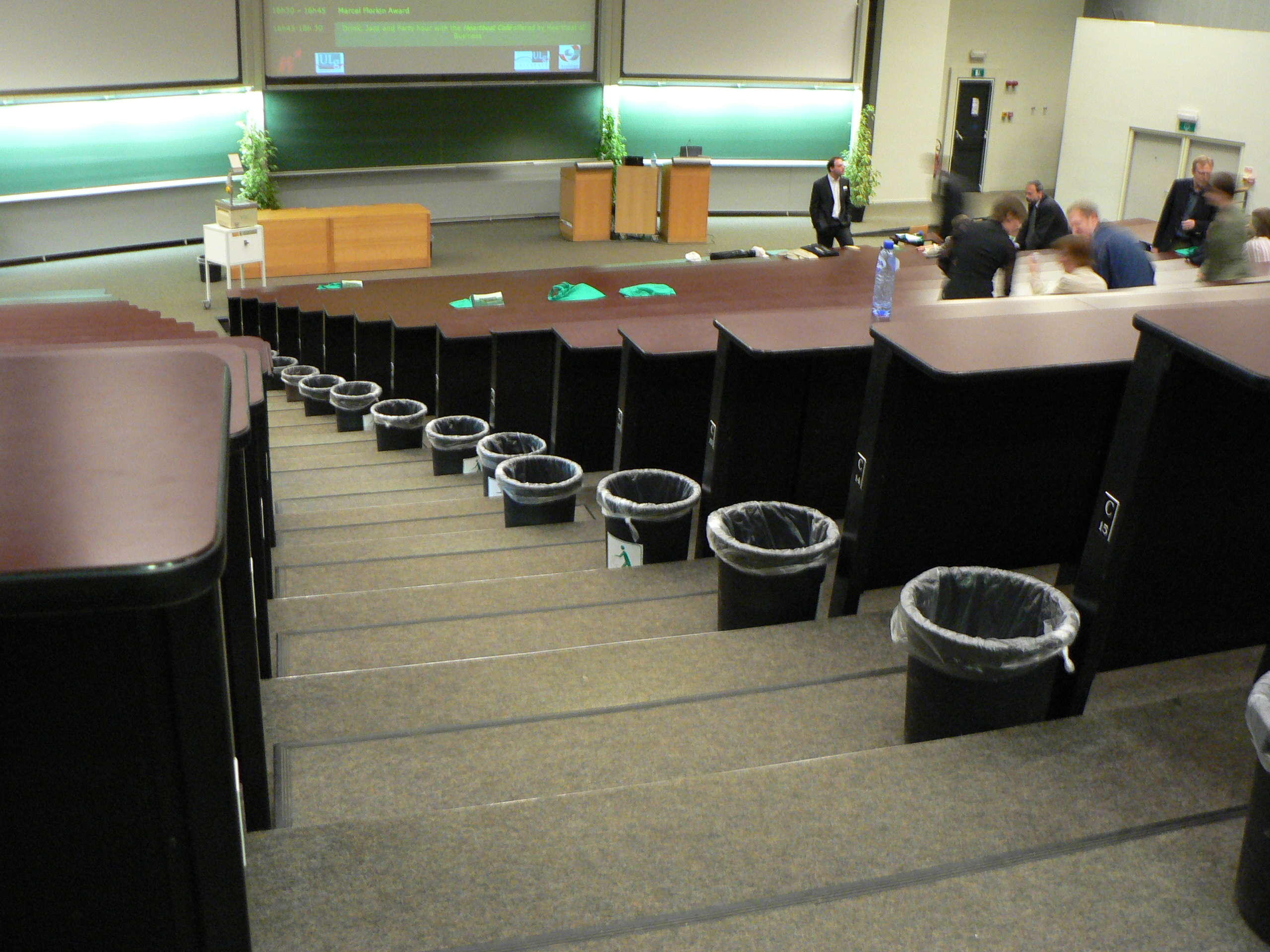 dust bins on a row - Amphithéatres de l'Europe, Sart Tilman, Liège, Belgium